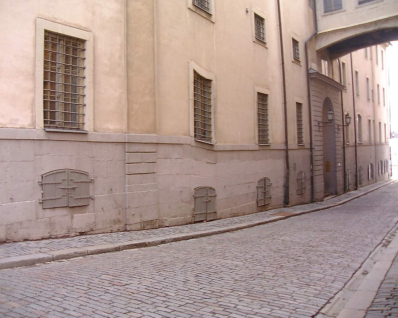 Windows on Norra Bankohuset at Norra Bankogränd in Gamla stan, Stockholm.